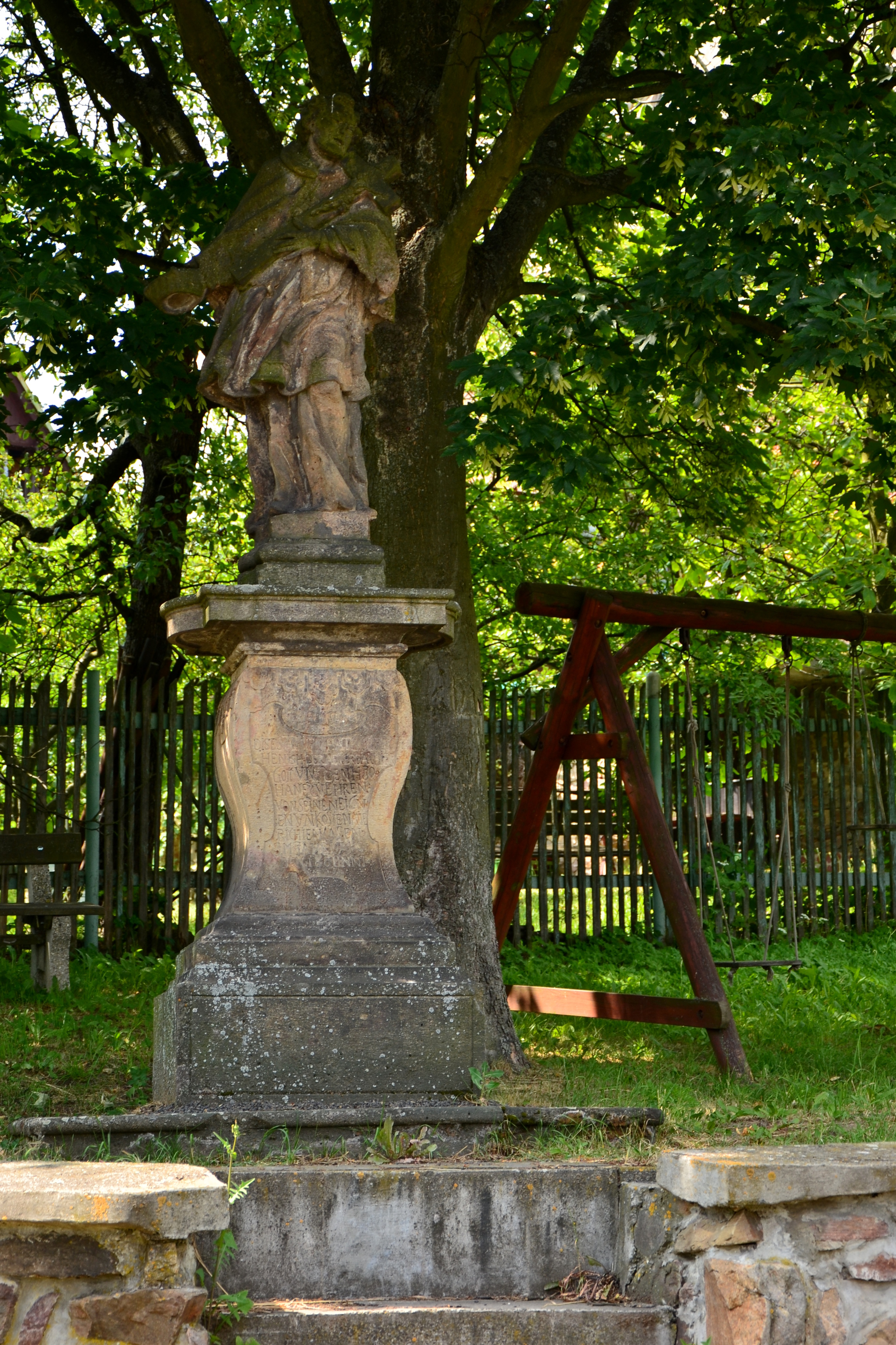 Socha sv. Jana Nepomuckého (Blahuňov), Blahuňov